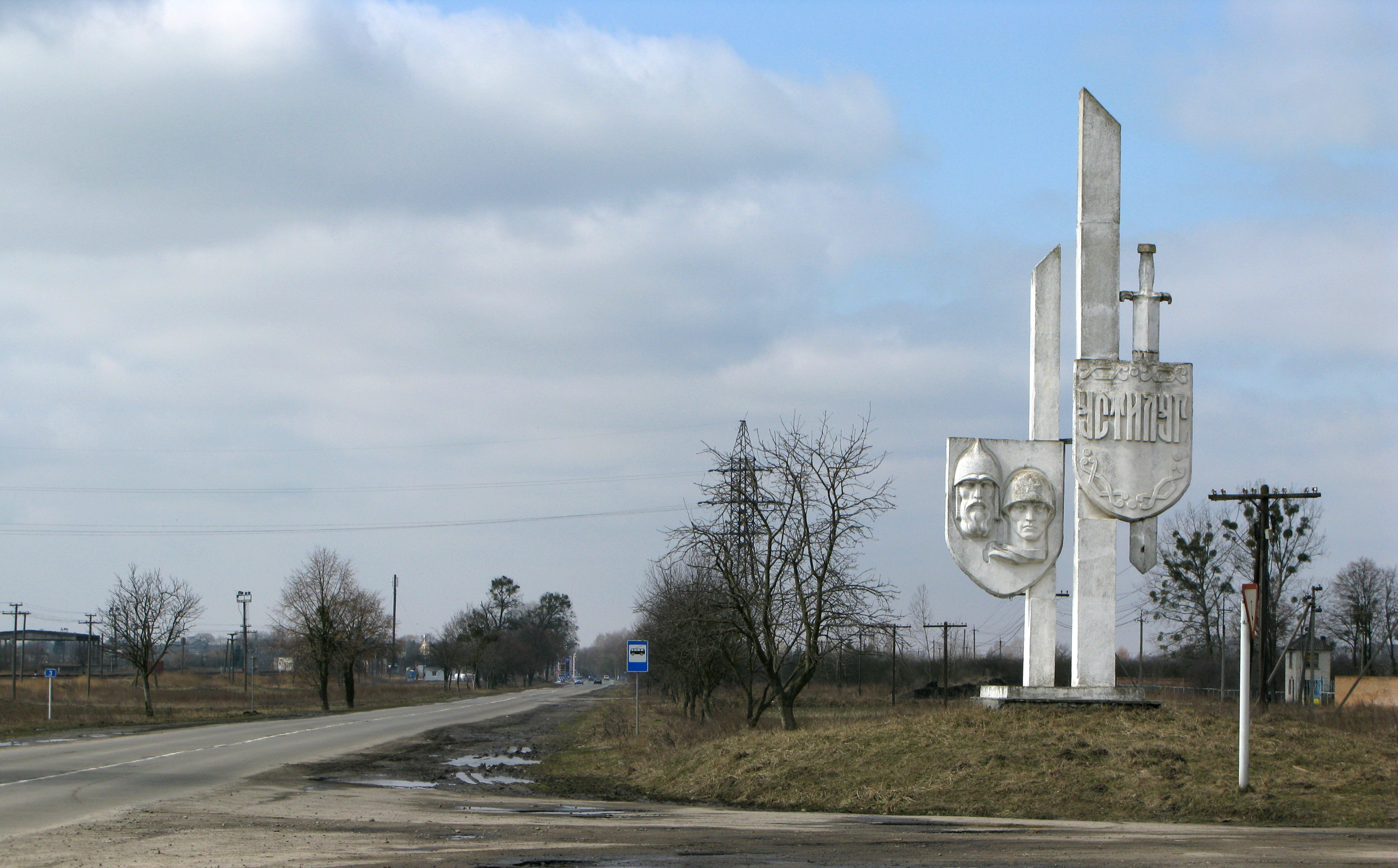 Устилуг, Волинська область, знак при в`їзді в місто